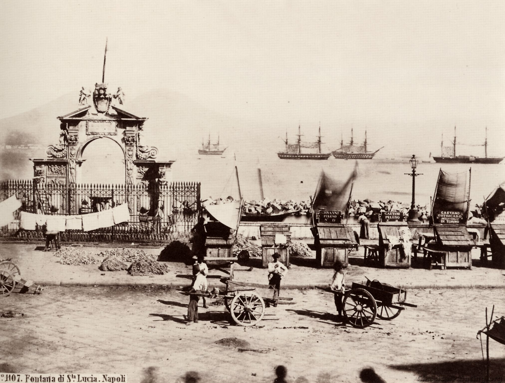 Fontana di santa Lucia (Napoli). Catalogo no. 1107.